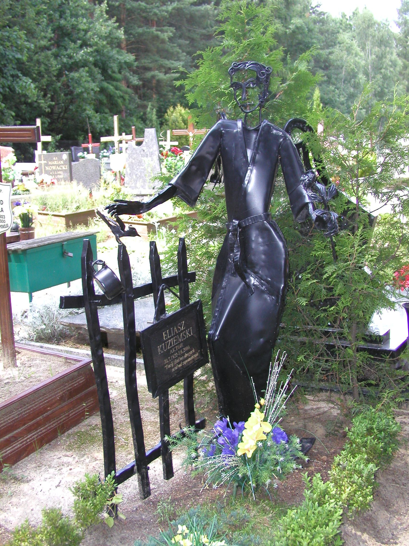 Grób Eliasza Kuziemskiego - aktora - Oborniki Śl. Autor: Barbara Wrzesińska Data: VI 2005